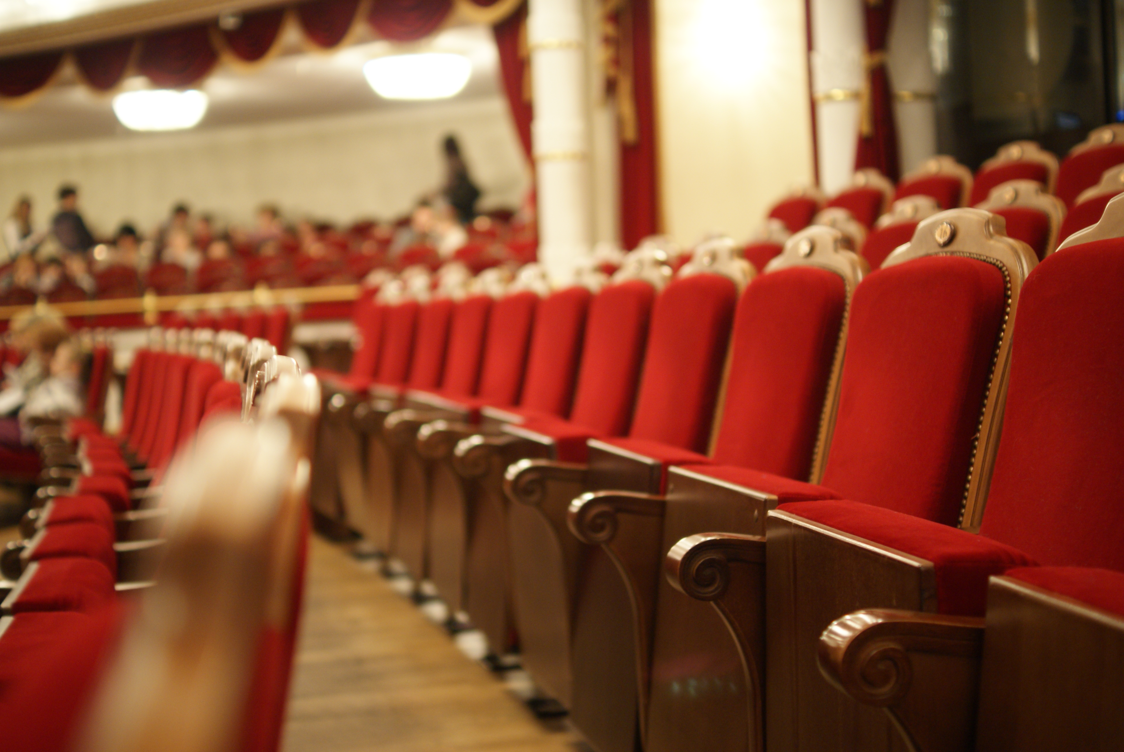 Нацыянальны акадэмічны Вялікі тэатр оперы і балета